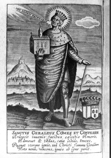 Représentation de Saint Géraud dAurillac, frontispice d'une Vie de saint Géraud. fin XVIIe